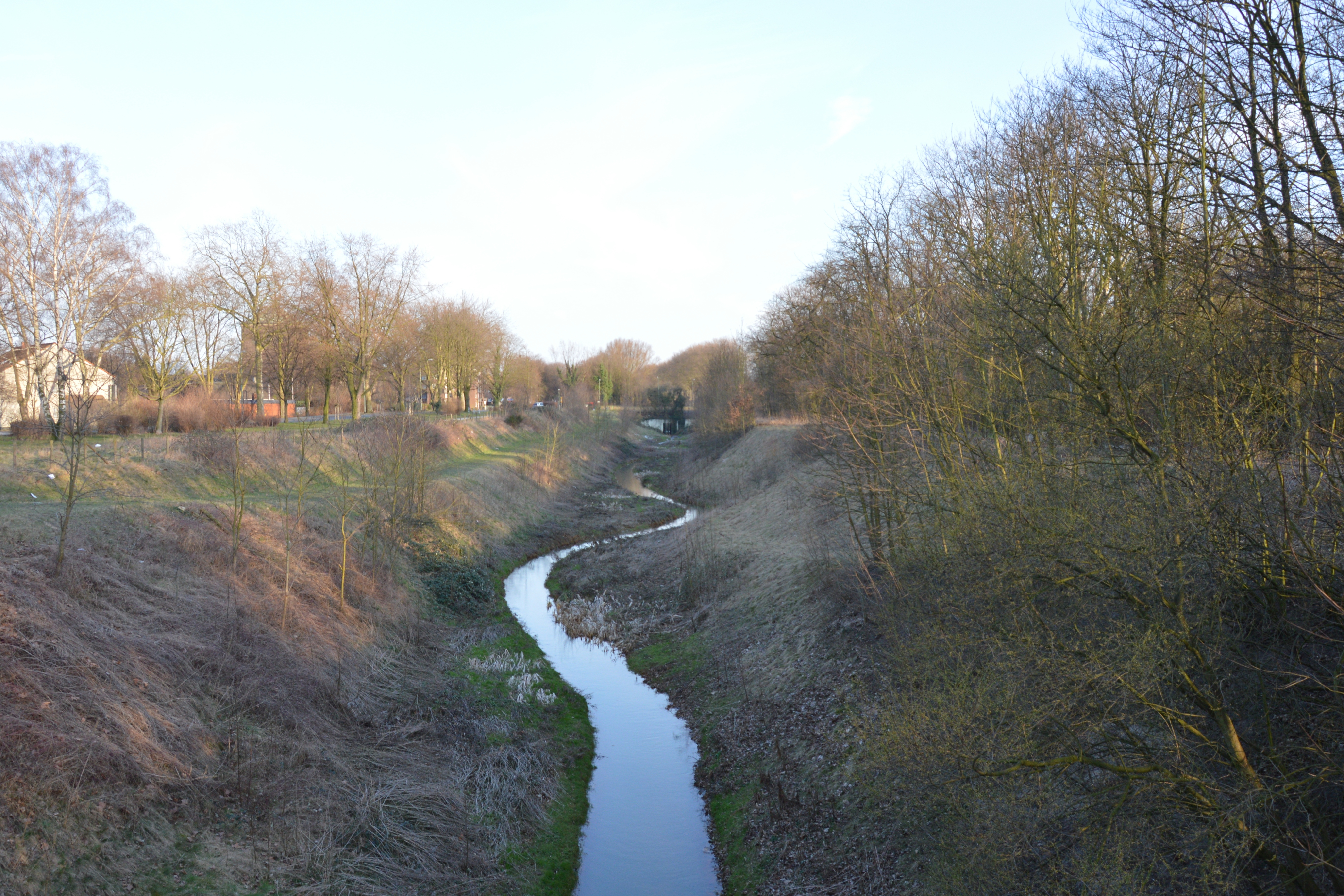 Kleine Emscher in Duisburg, von der Brücke Warbruckstraße Richtung Süden